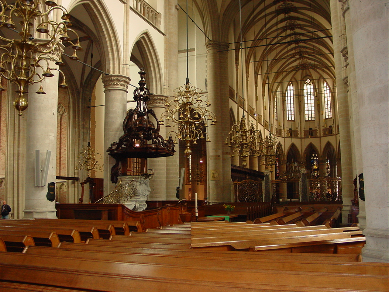 Grote of Onze-Lieve-Vrouwekerk (Dordrecht, The Netherlands)